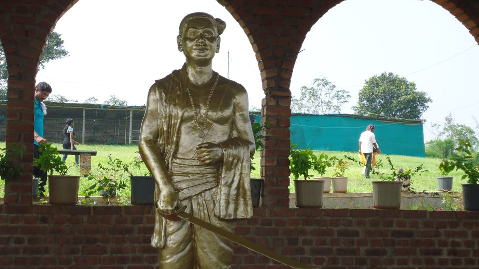 വീരപഴശി